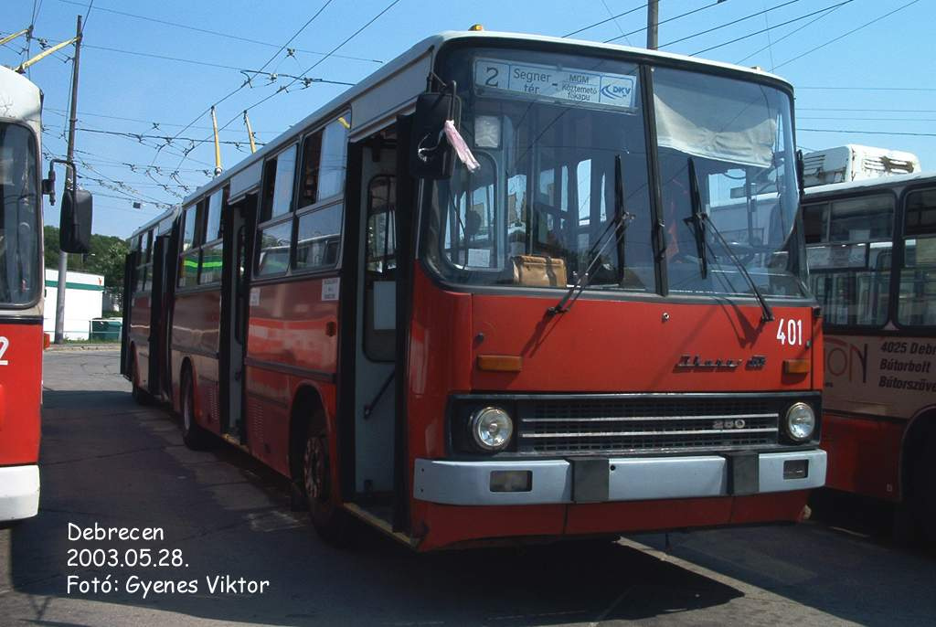 A 401-es pályaszámú Ikarus 280-as trolibusz Debrecenben